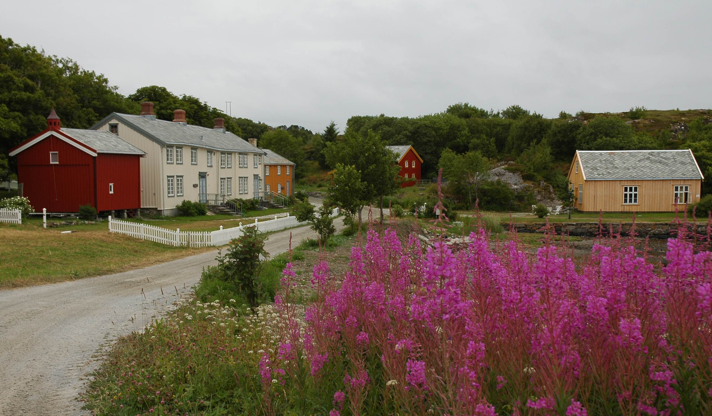 Vallersund Camphillandsby og gamle handelsted